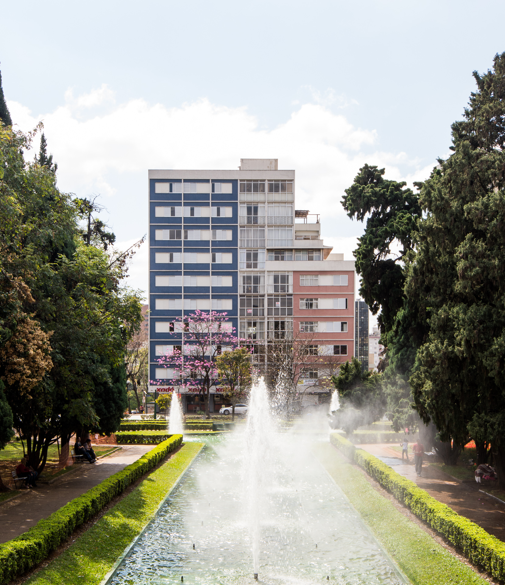 Edifício Mape, na Praça da Liberdade, em Belo Horizonte. Projetado por Sylvio de Vasconcellos e concluído em 1958.